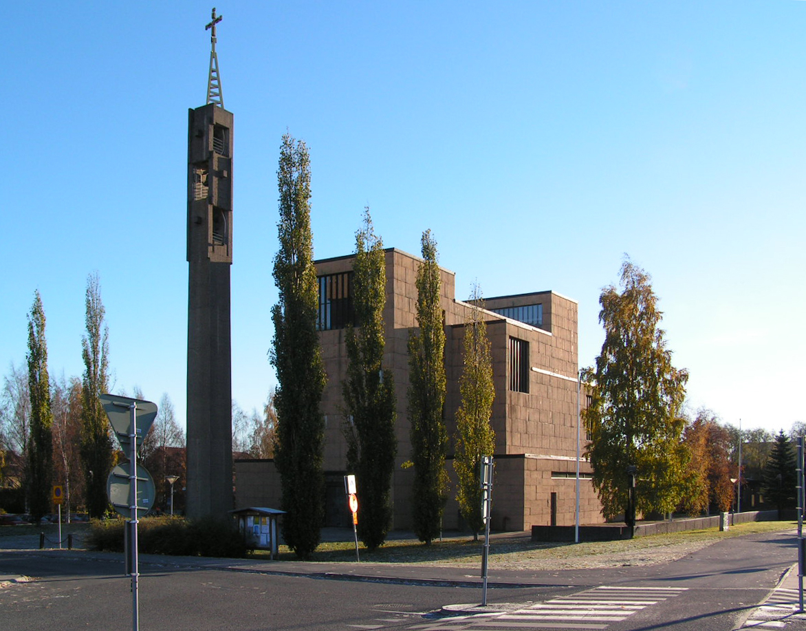 Teg Church, Umeå (Tegs kyrka, Umeå)